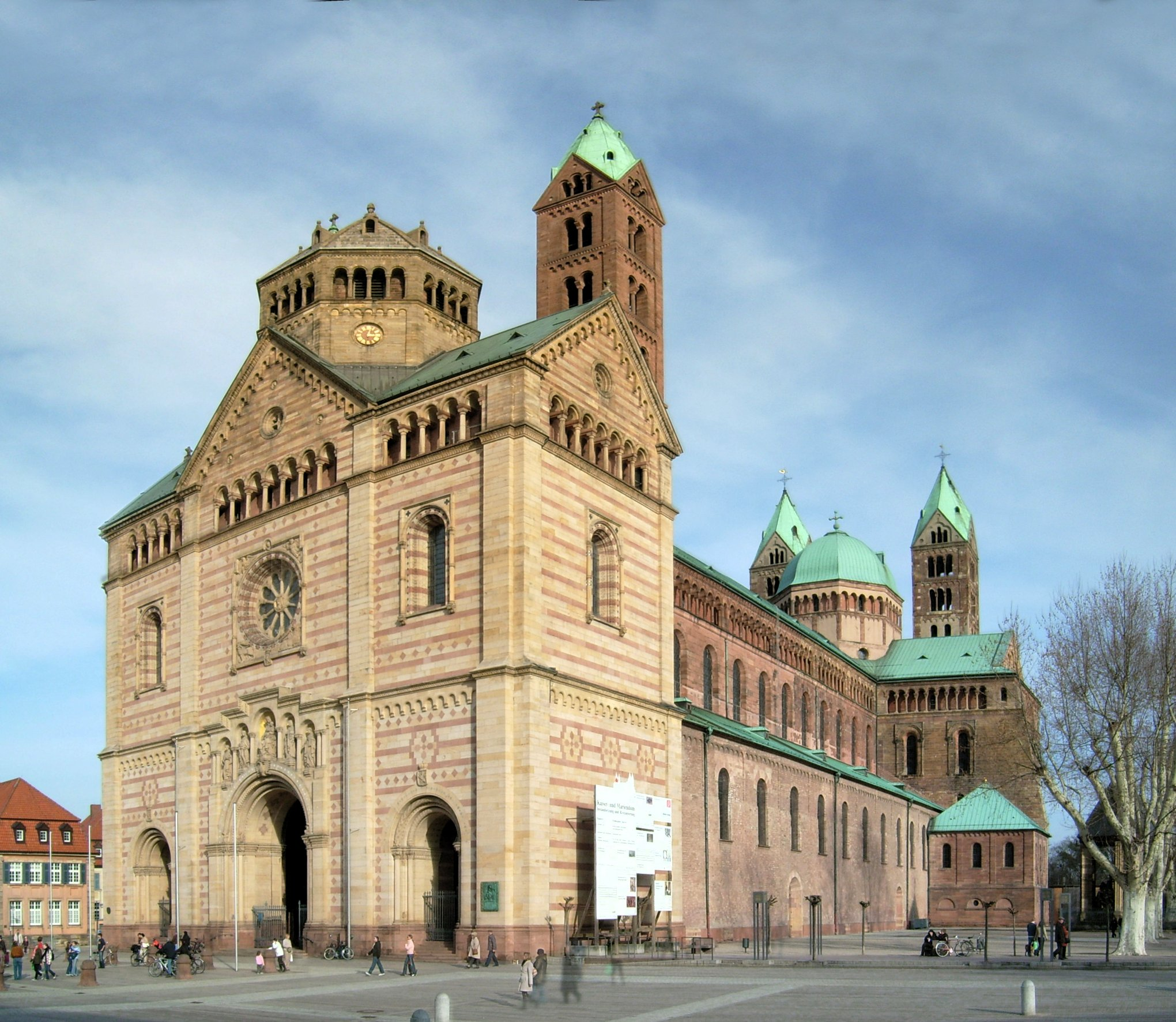 Dom zu Speyer